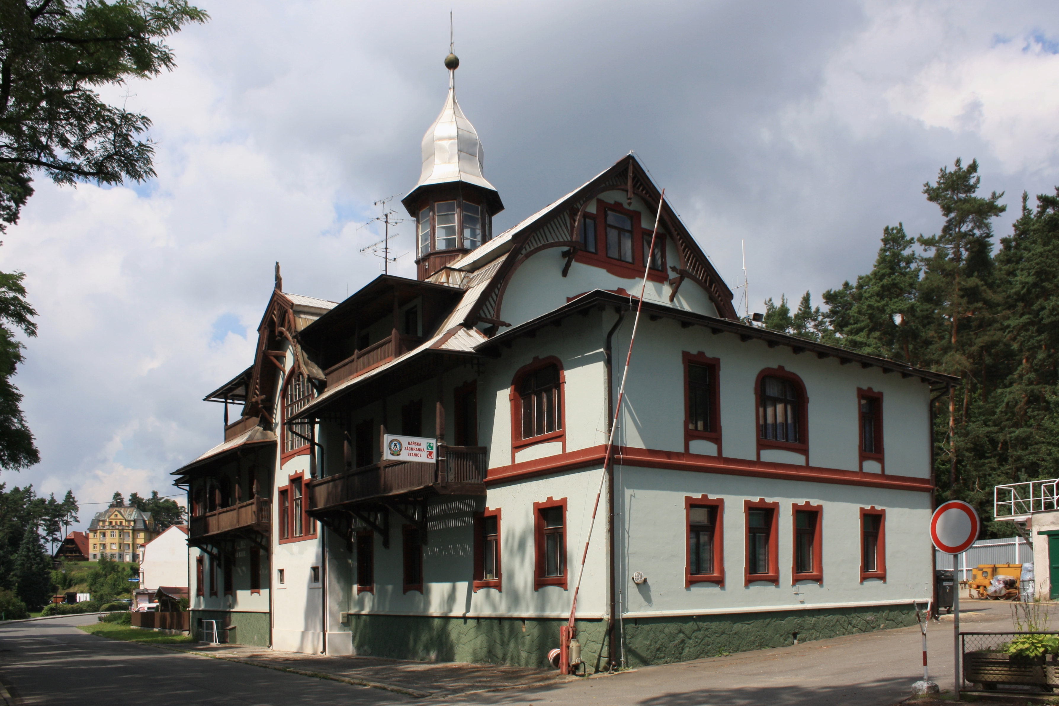 Česky: Hamr na Jezeře